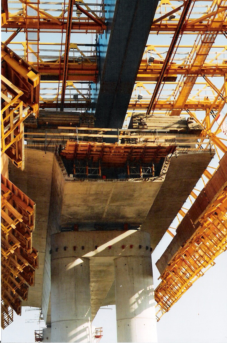 Autor: Benutzer:Klugschnacker, , selbst fotografiert Stralsund, Rügenbrücke, Schalungskonstruktion für die Brücke über dem Dänholm, von unten fotografiert im Oktober 2005. cantilevered falsework